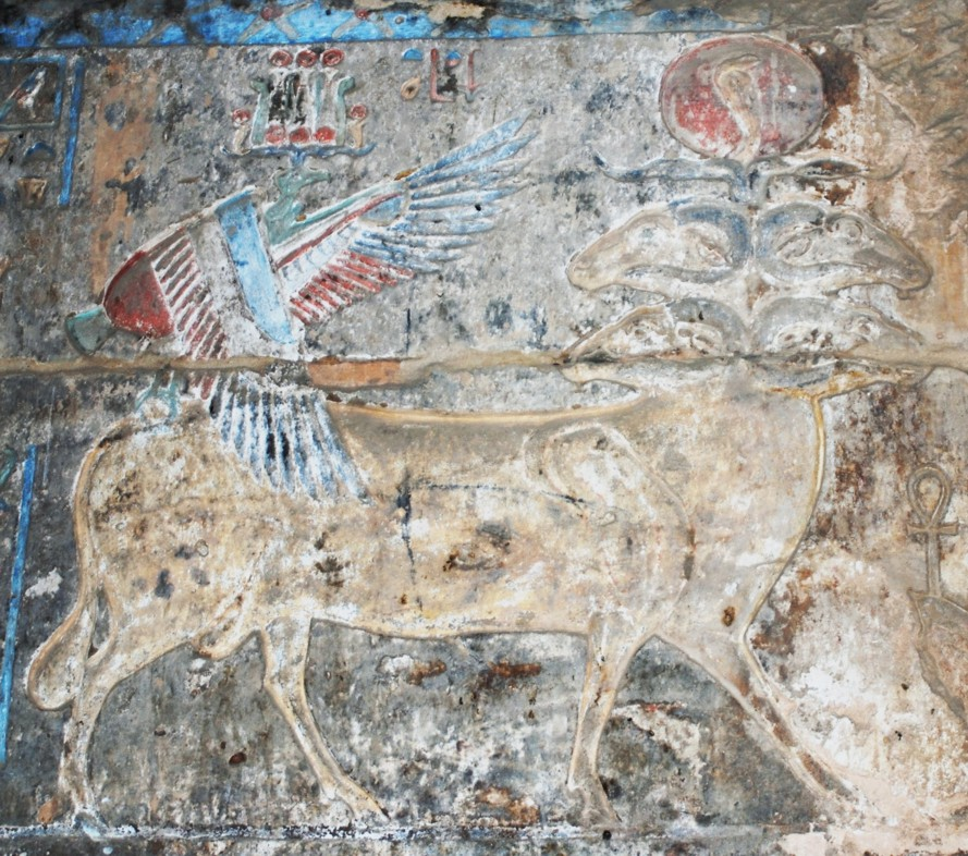 Banebdjedet, le bélier de Mendès